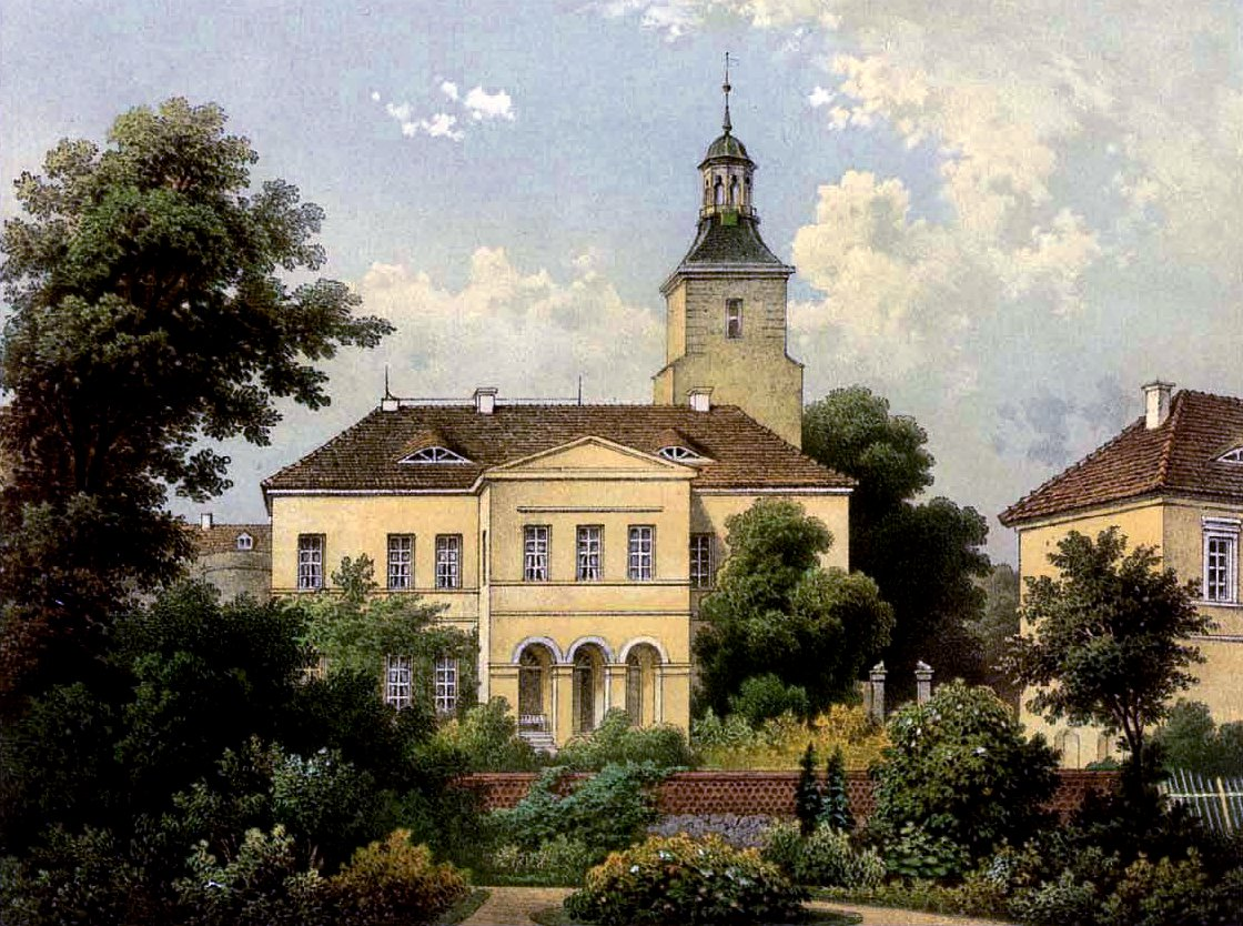 Schloss Sommerfeld, Kreis Krossen, Provinz Brandenburg